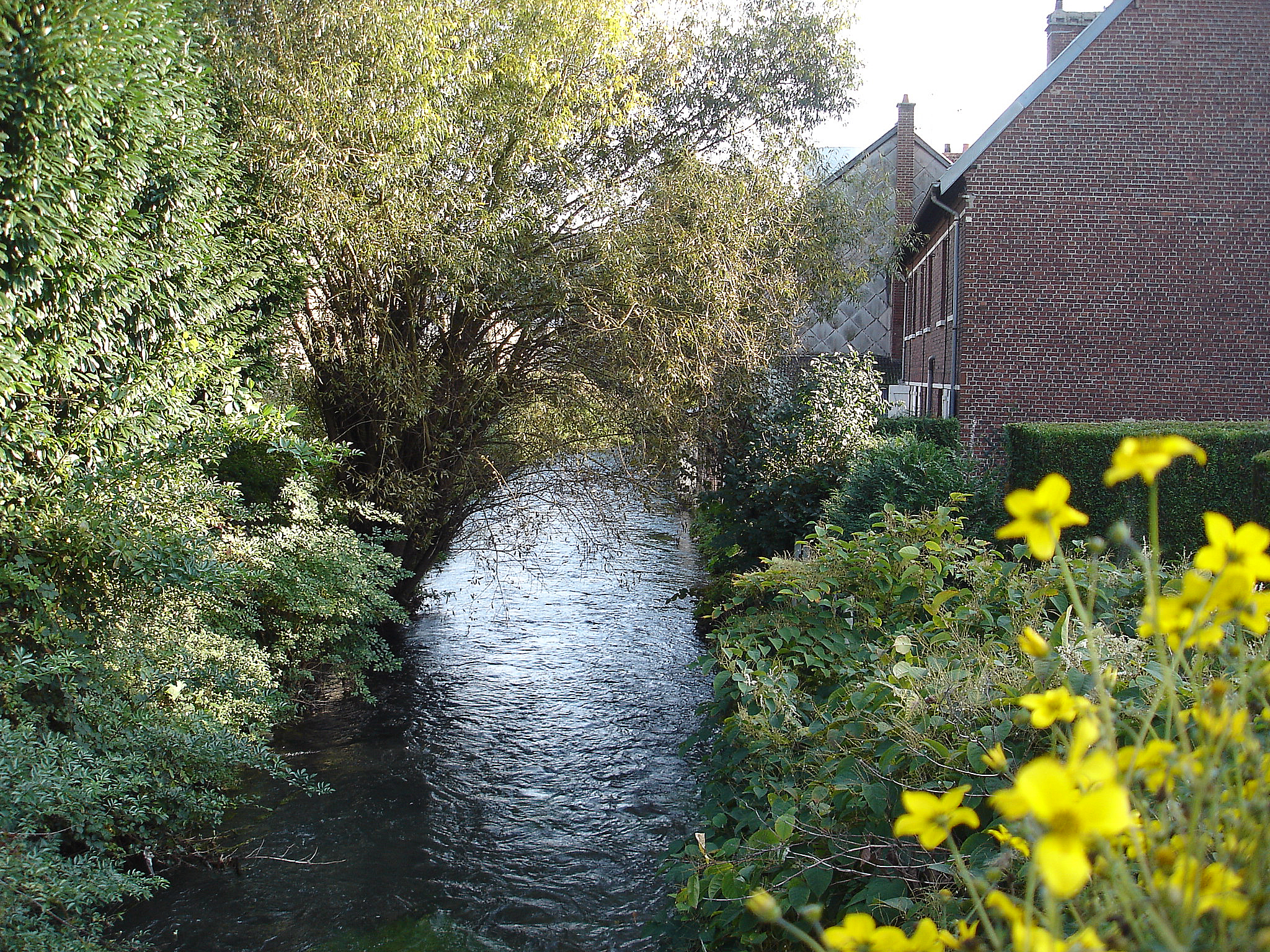 La Caily à Déville-les-Rouen